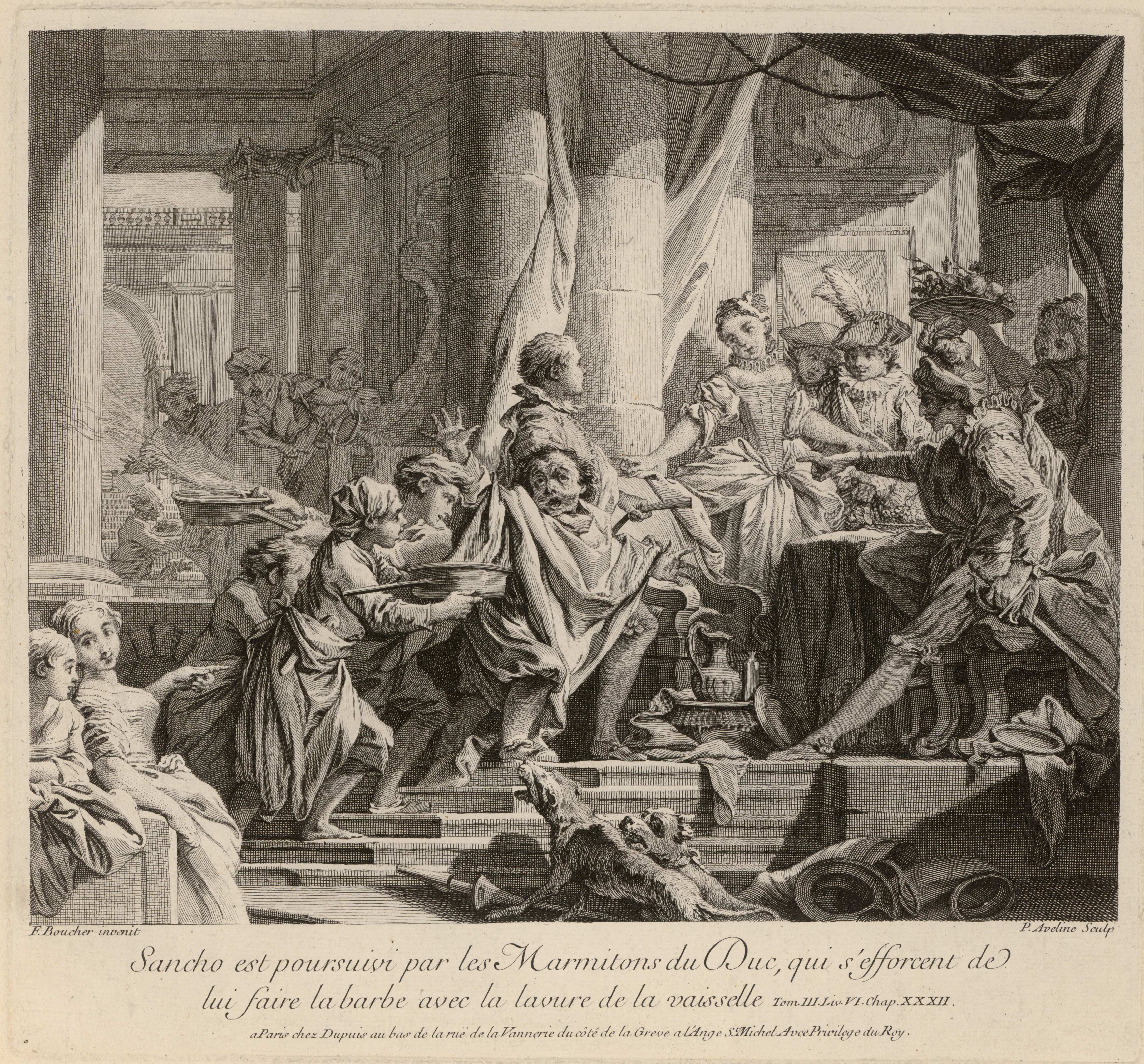 Pierre-Alexandre Aveline según François Boucher, Sancho no se deja lavar en casa de los duques, aguafuerte y buril. Inscripción: Sancho est poursuivi par les Marmitons du Duc, qui s'efforcent de / lui faire la barbe avec la lavure de la vaisselle.